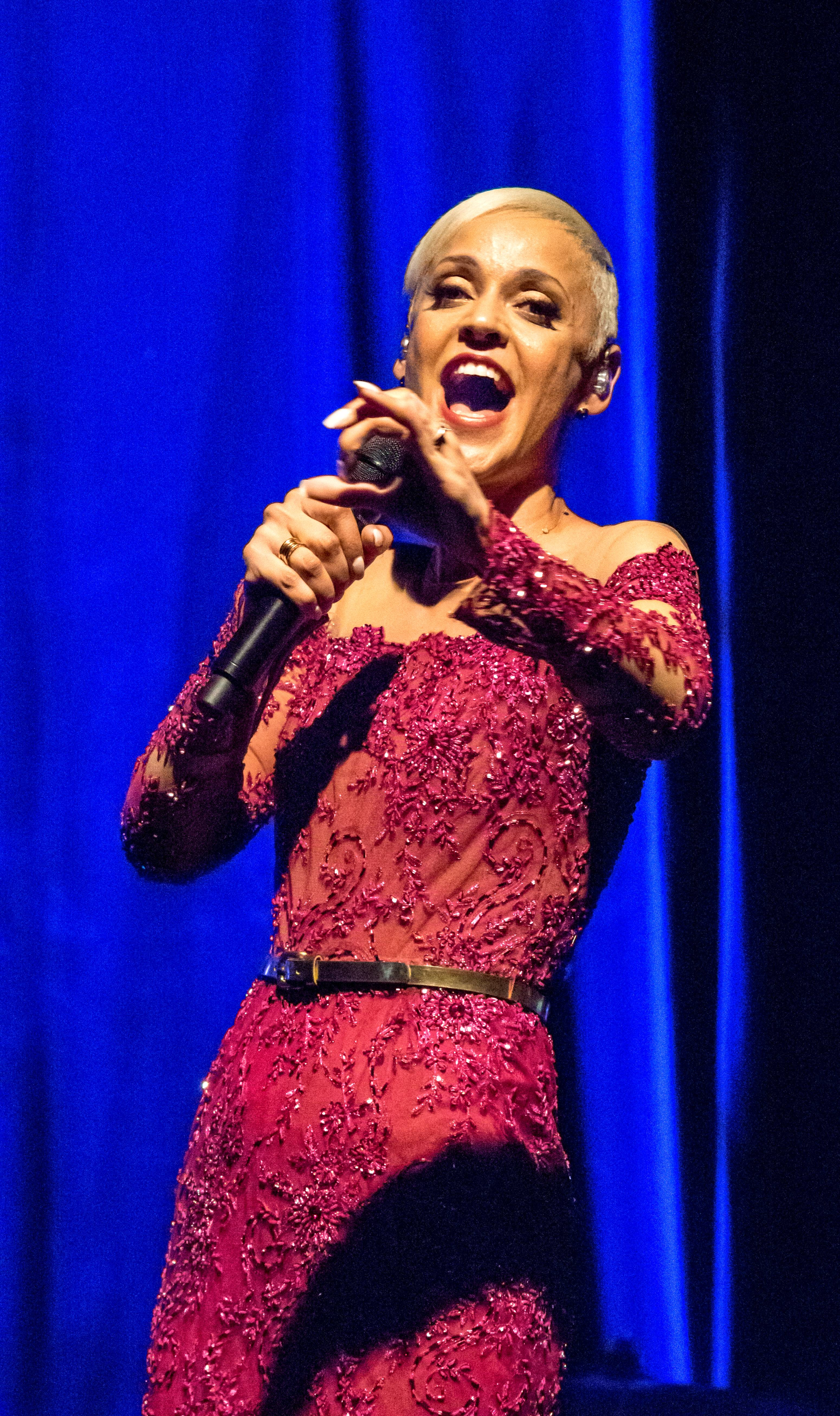 Bilder vom ZMF 2015 Mariza